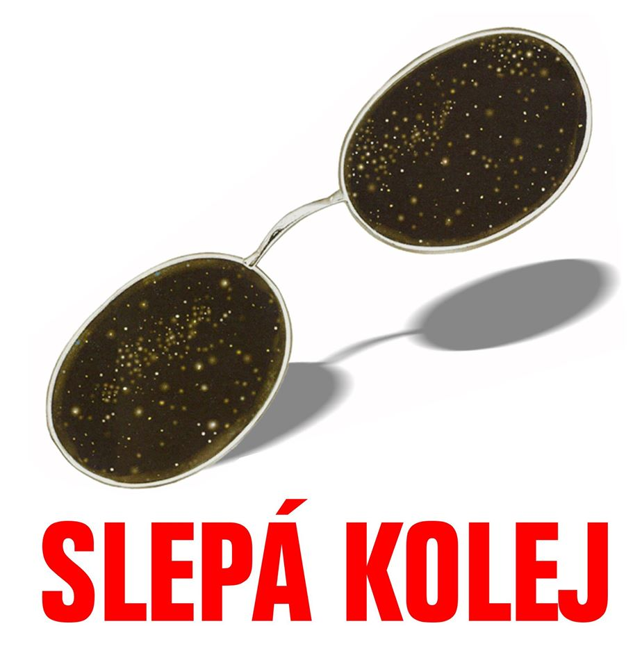 Glasses SK